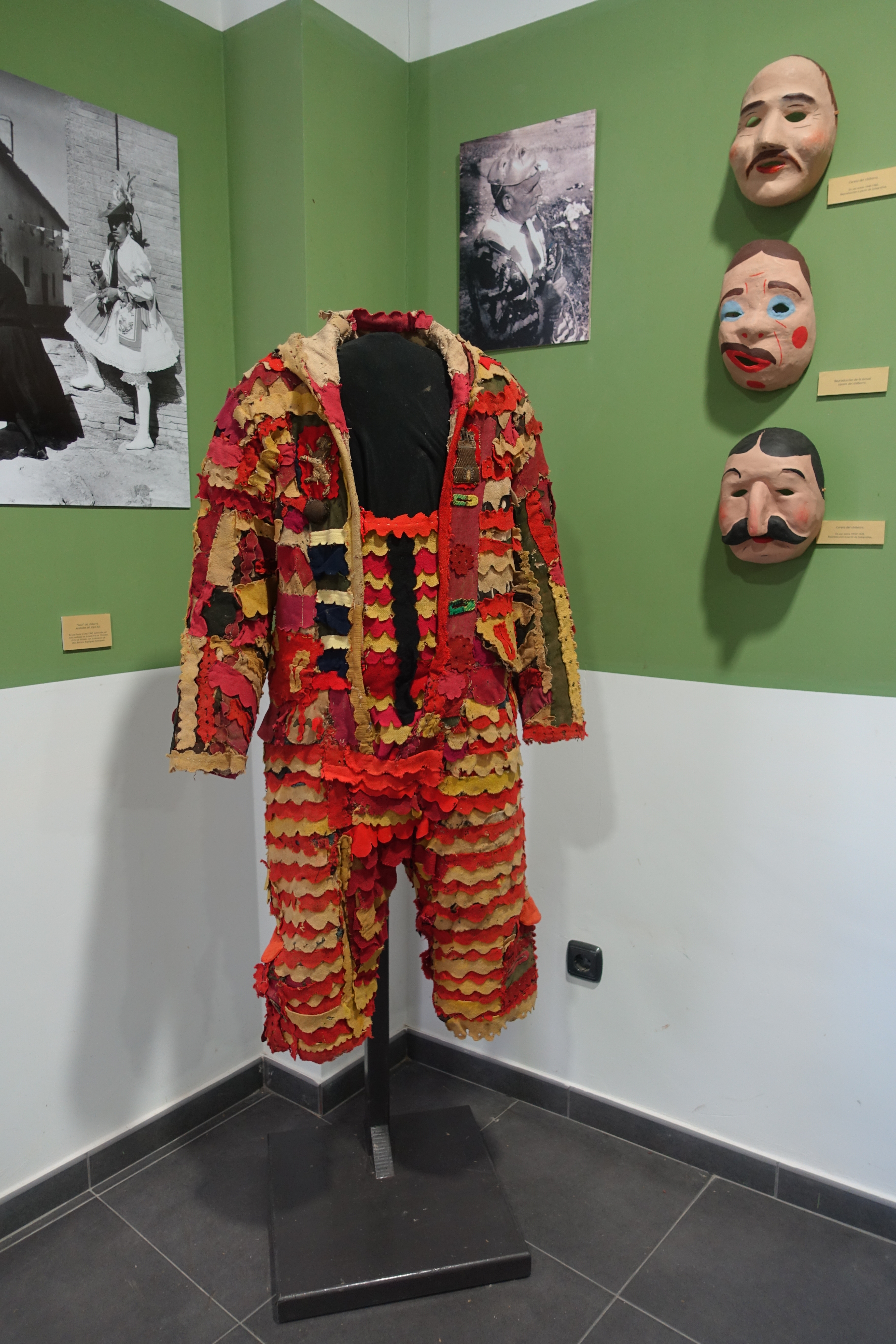 Indumentaria tradicional de la fiesta del chiborra en el Museo de la Danza de Cisneros (Palencia, España).